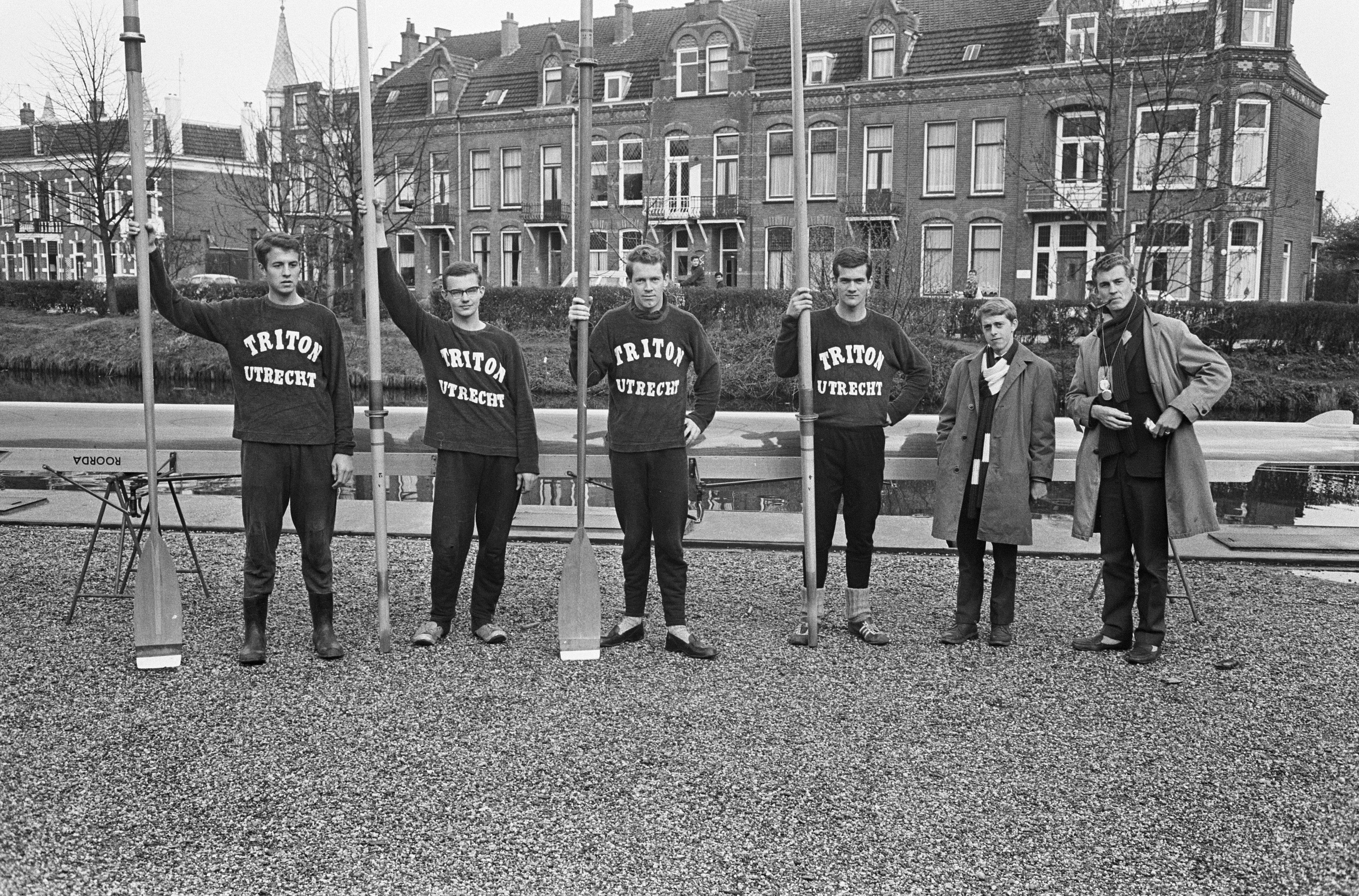 Collectie / Archief : Fotocollectie Anefo Reportage / Serie : [ onbekend ] Beschrijving : Tritons Oude Vier met stuurman in training voor Varsity v.l.n.r. Jansen, Dijk, Hartsuiker, H. J. Aa (stuurman) Van Riet (coach) en Jansen Datum : 22 april 1965 Trefwoorden : stuurmannen, trainingen Persoonsnaam : H. J. Aa Instellingsnaam : Varsity Fotograaf : Koch, Eric / Anefo Auteursrechthebbende : Nationaal Archief Materiaalsoort : Negatief (zwart/wit) Nummer archiefinventaris : bekijk toegang 2.24.01.05 Bestanddeelnummer : 917-6782